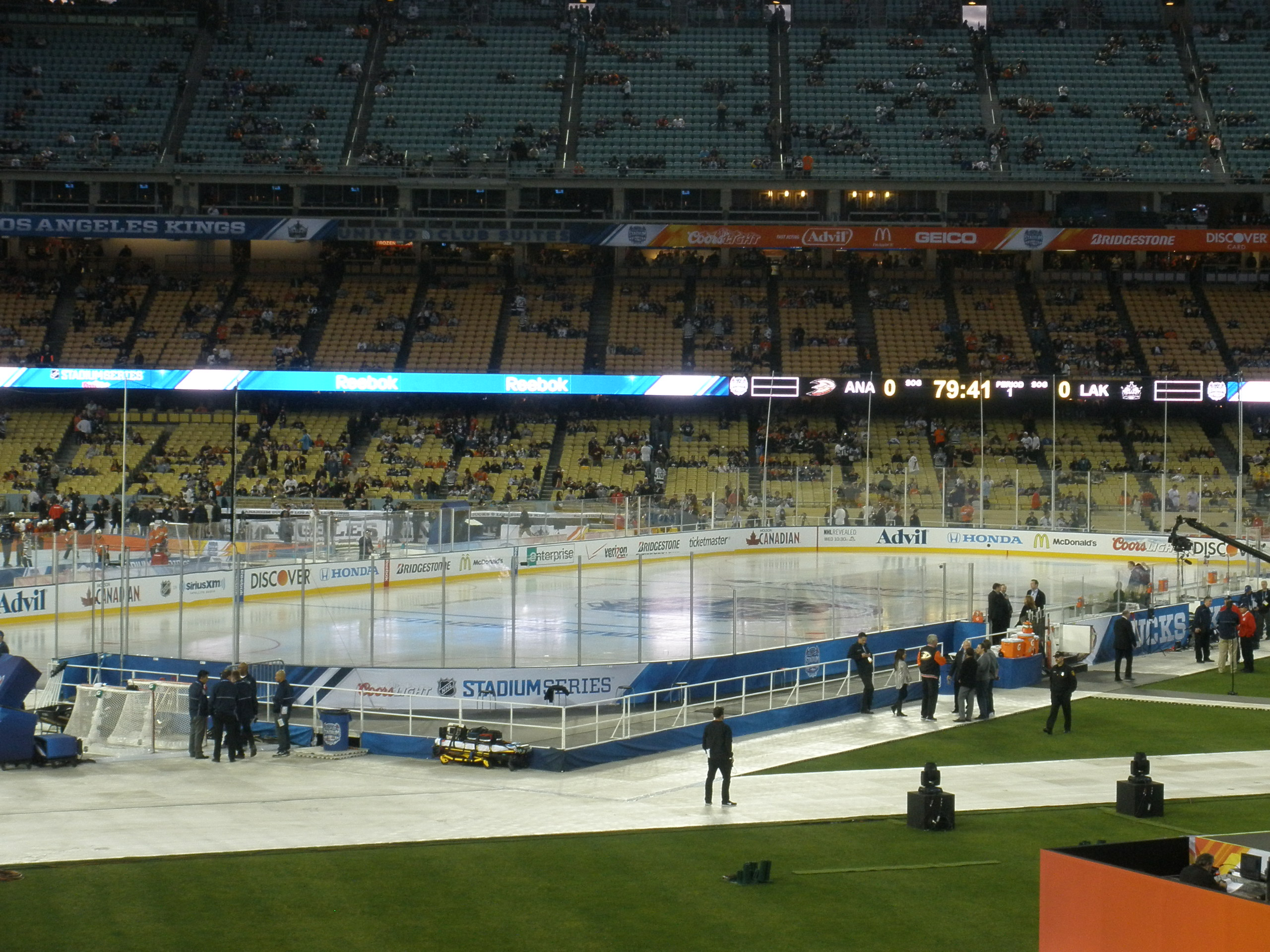 NHL Stadium Series Ducks Kings